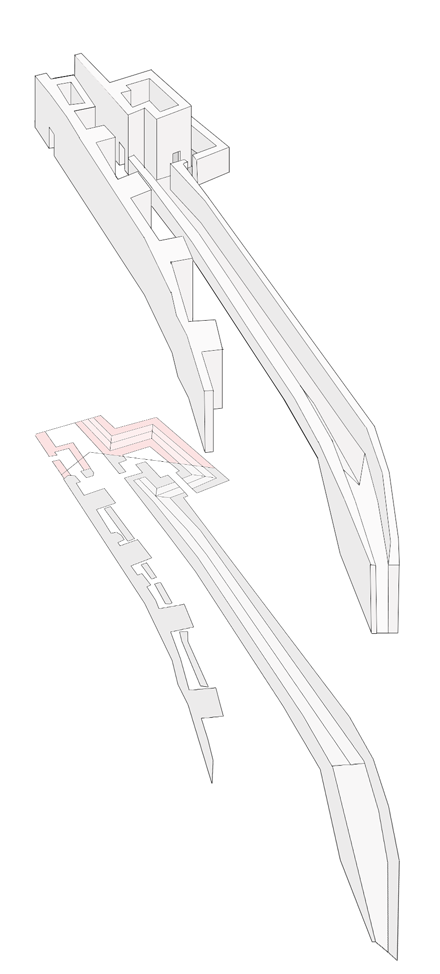 Reconstrucción ideal de la Puerta de Gibraltar y de las murallas del Parque arqueológico de las murallas meriníes de Algeciras (Andalucía, España).